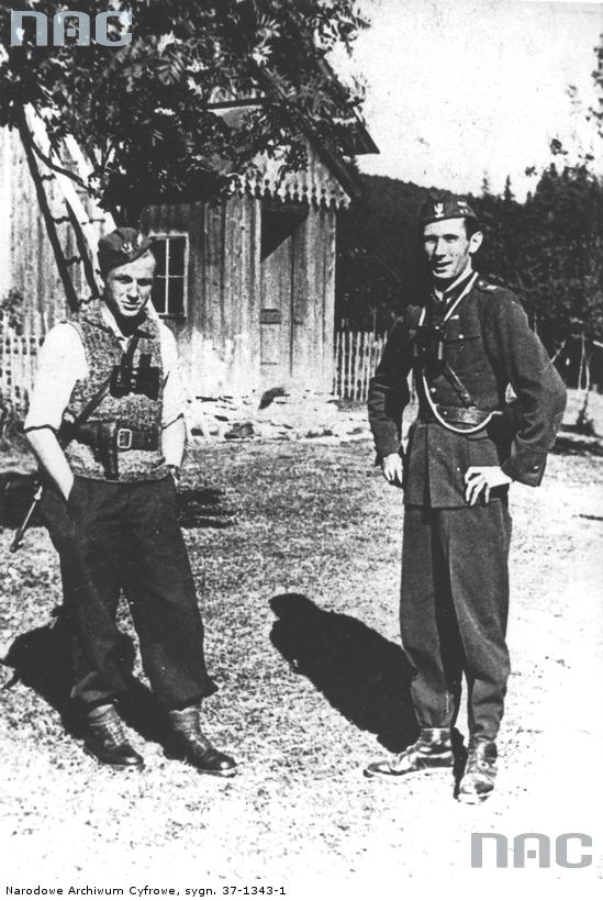 Żołnierze 1 Pułku Strzelców Podhalańskich – Okręg Kraków Armii Krajowej: Oficerowie 1 batalionu - od lewej: ppor. Feliks Perekładowski ps. "Przyjaciel 2", dowódca Batalionu por. Wojciech Lipczewski ps. "Andrzej".